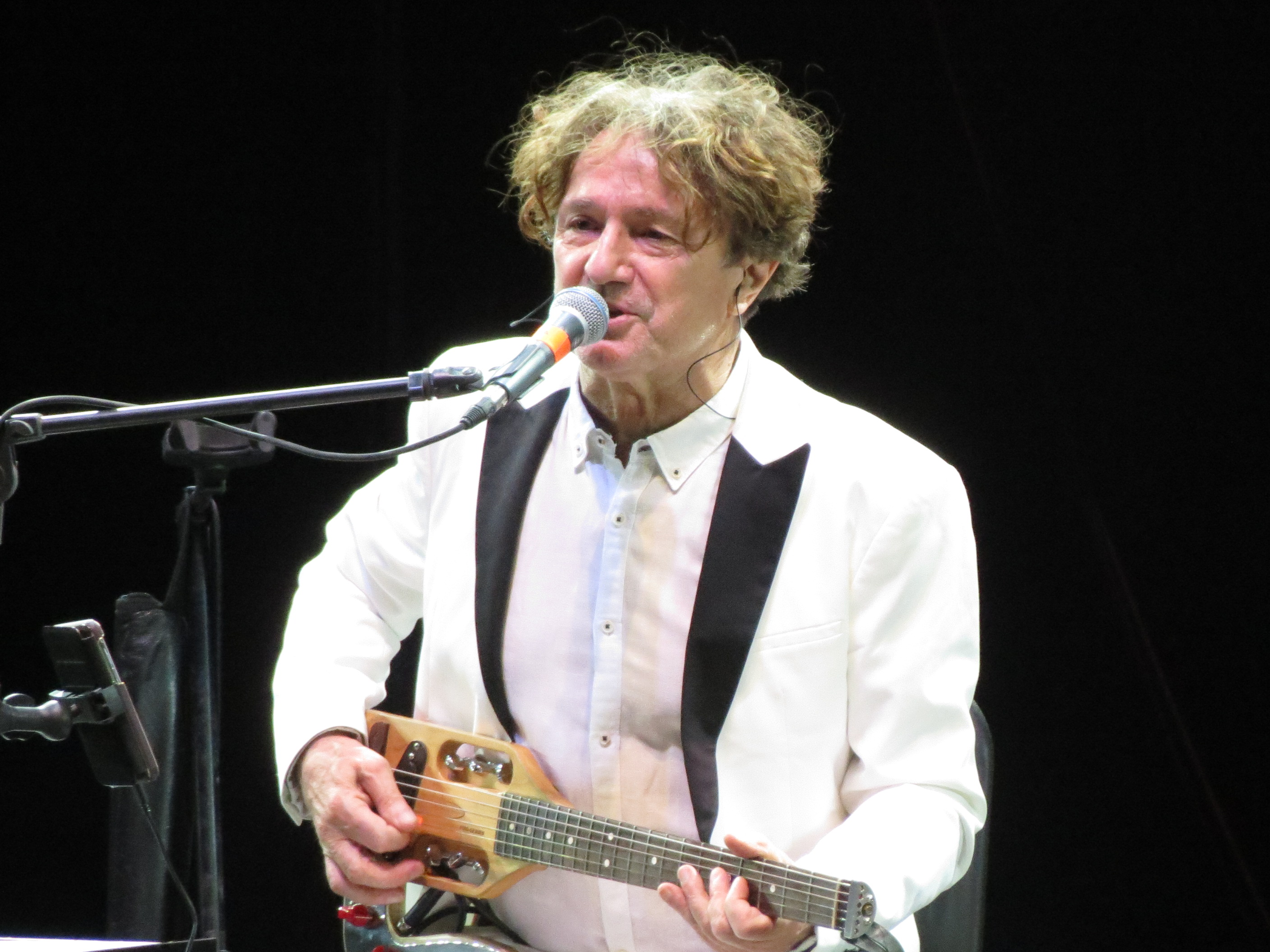 Goran Bregović y la Banda de Bodas y Funerales en la Feria Nacional de San Marcos 2019, Foro del Lago.